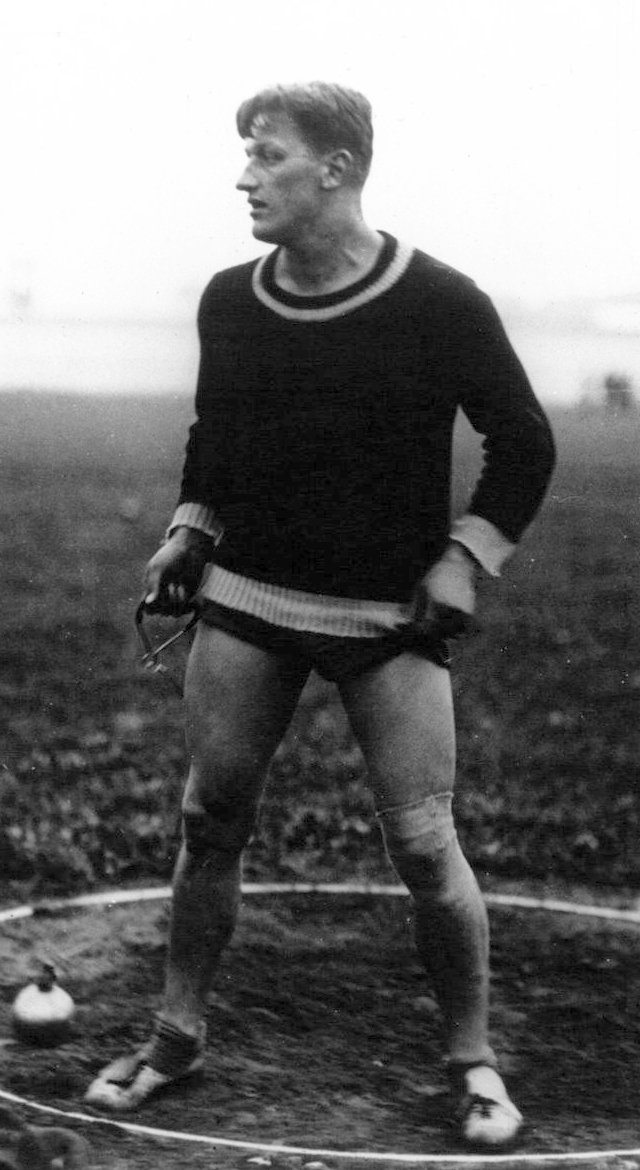 Un nouveau recordman du monde : le champion de Pologne Heliasz : [Heliasz à l'entraînement au lancer du marteau] : [photographie de presse] / Agence Mondial